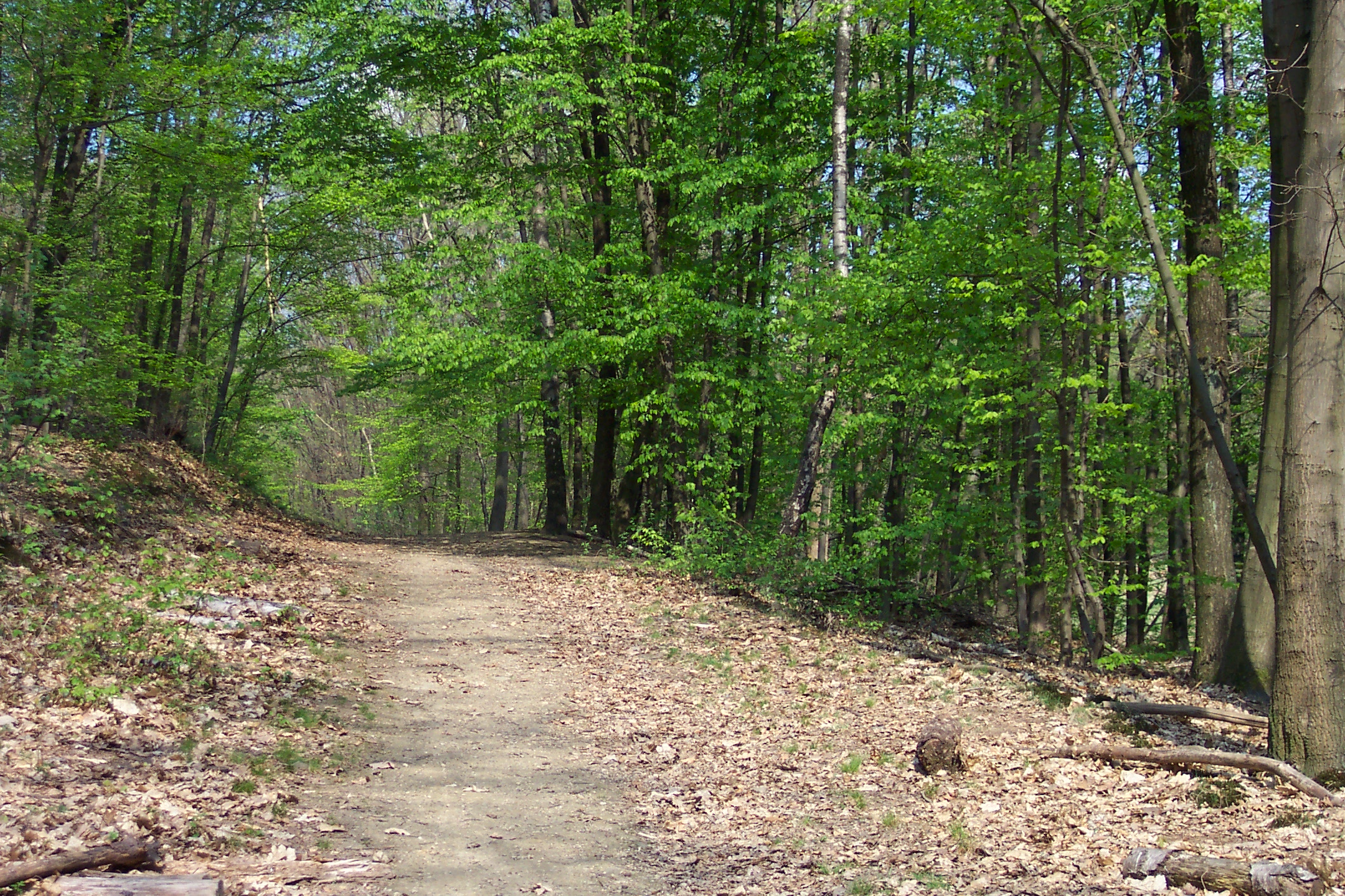 Falkenweg, Wuppertal